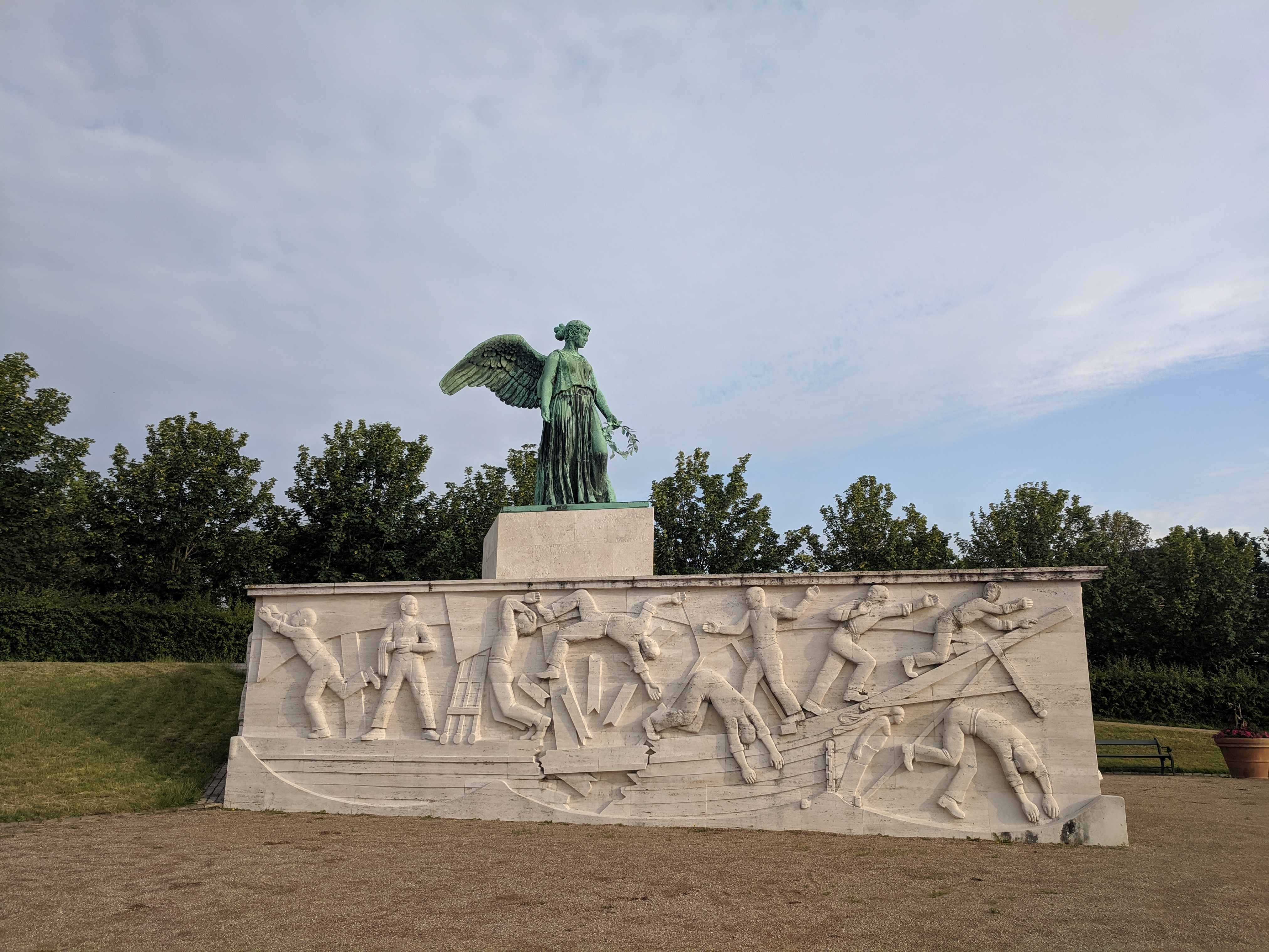 Søfartsmonumentet in Copenhagen, Denmark